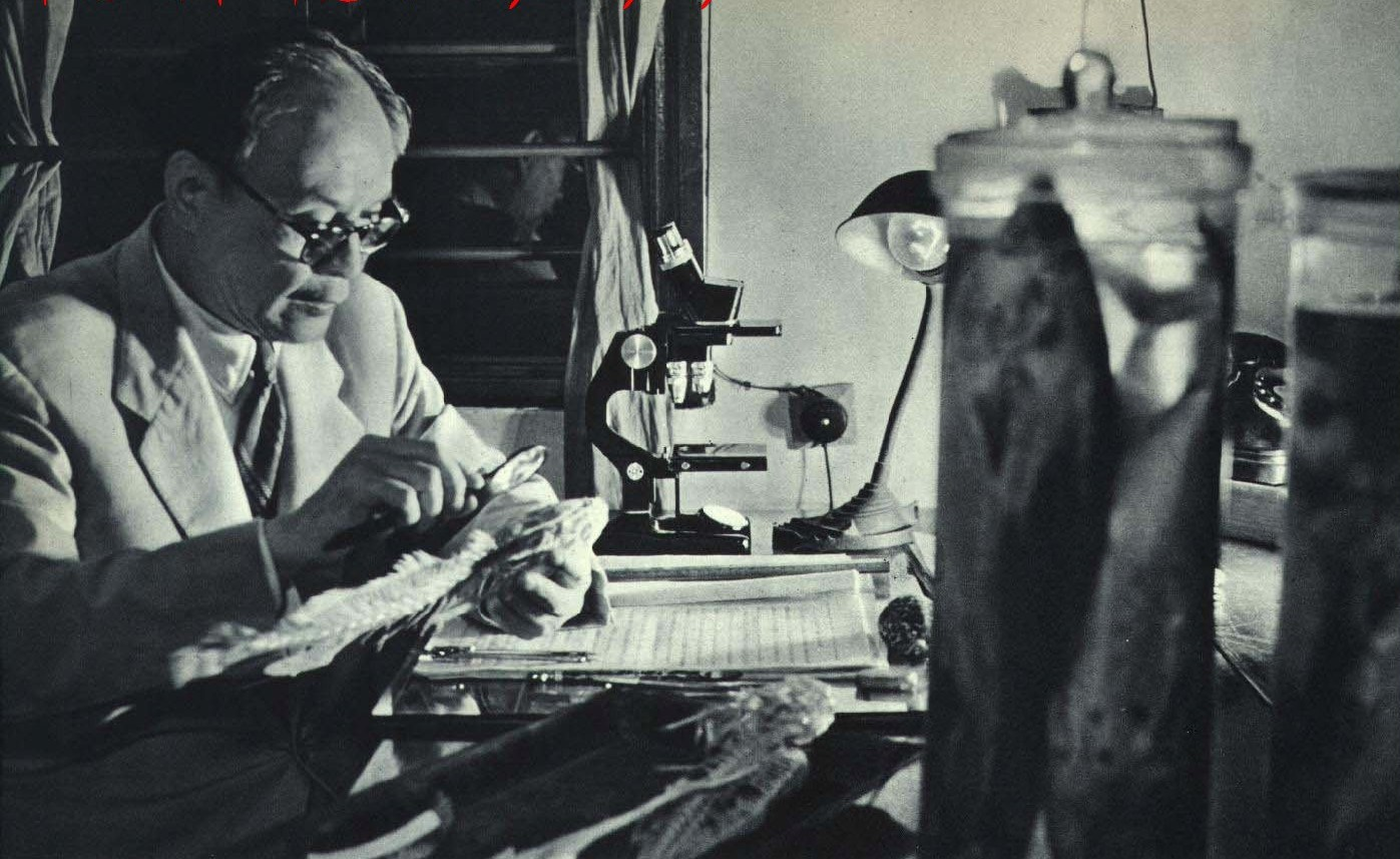 1963-03 1963年 朱元鼎